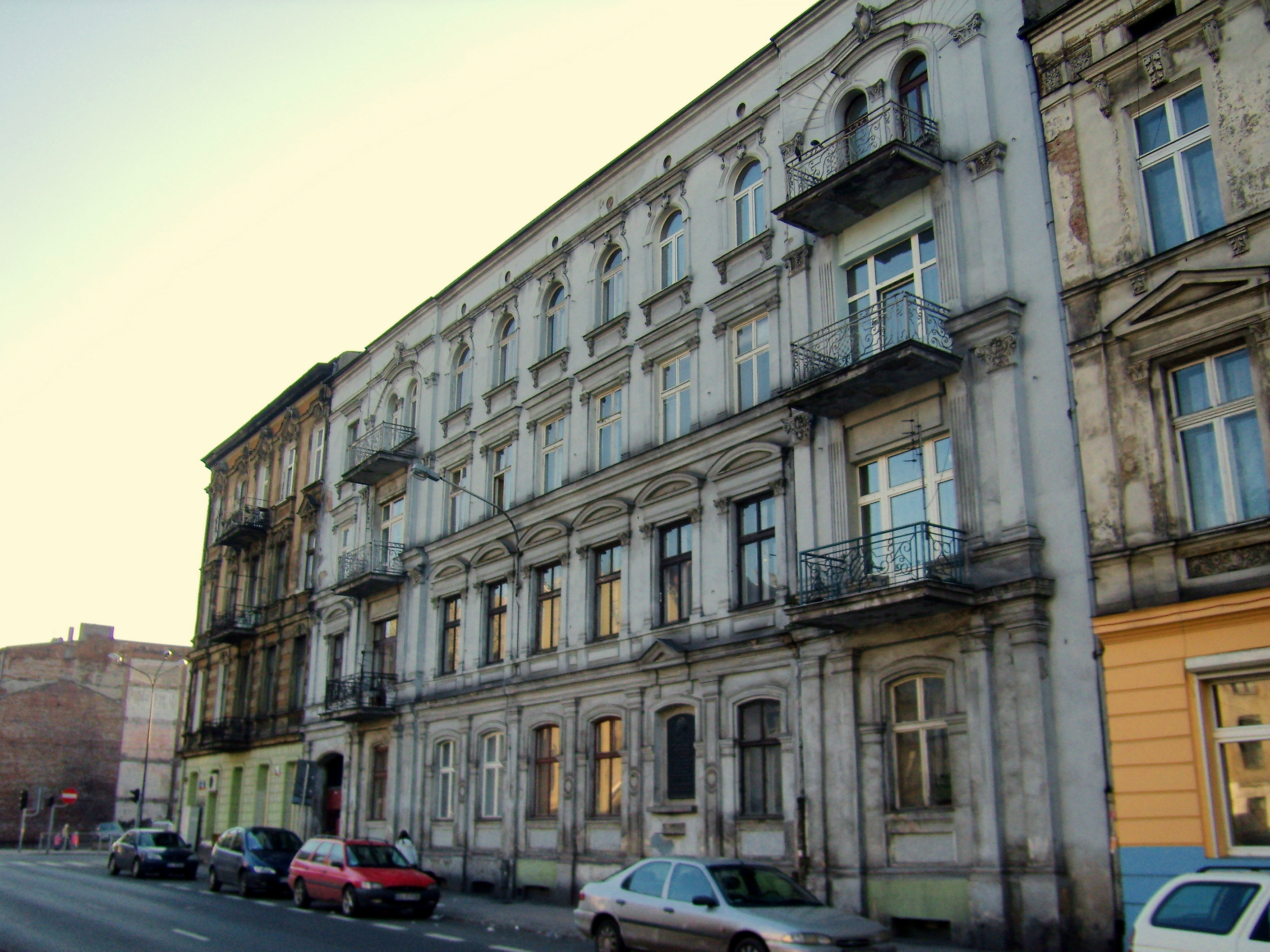 Łódź, ul. Wschodnia 19